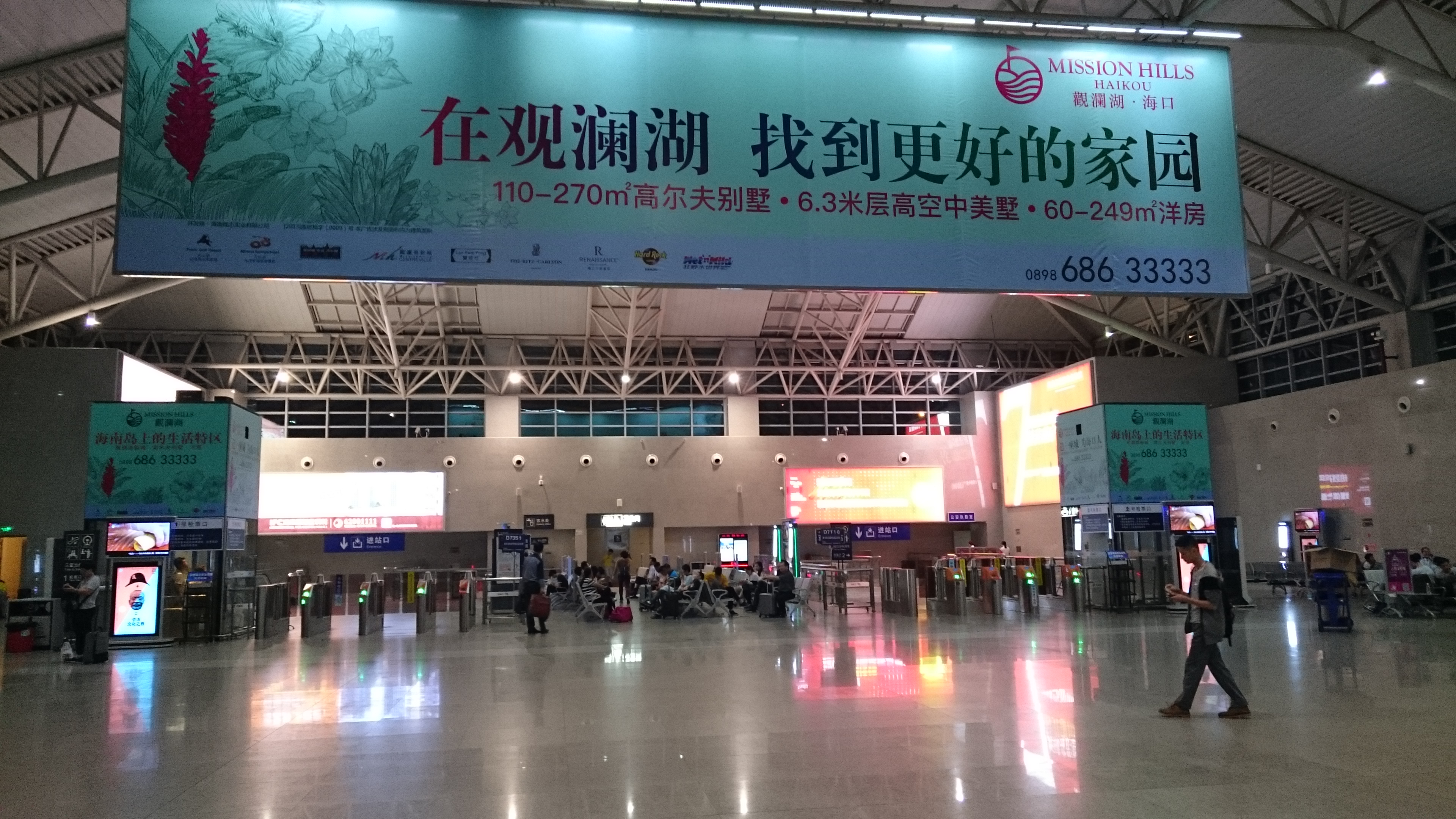 中国海南環東高鉄美蘭駅構内2